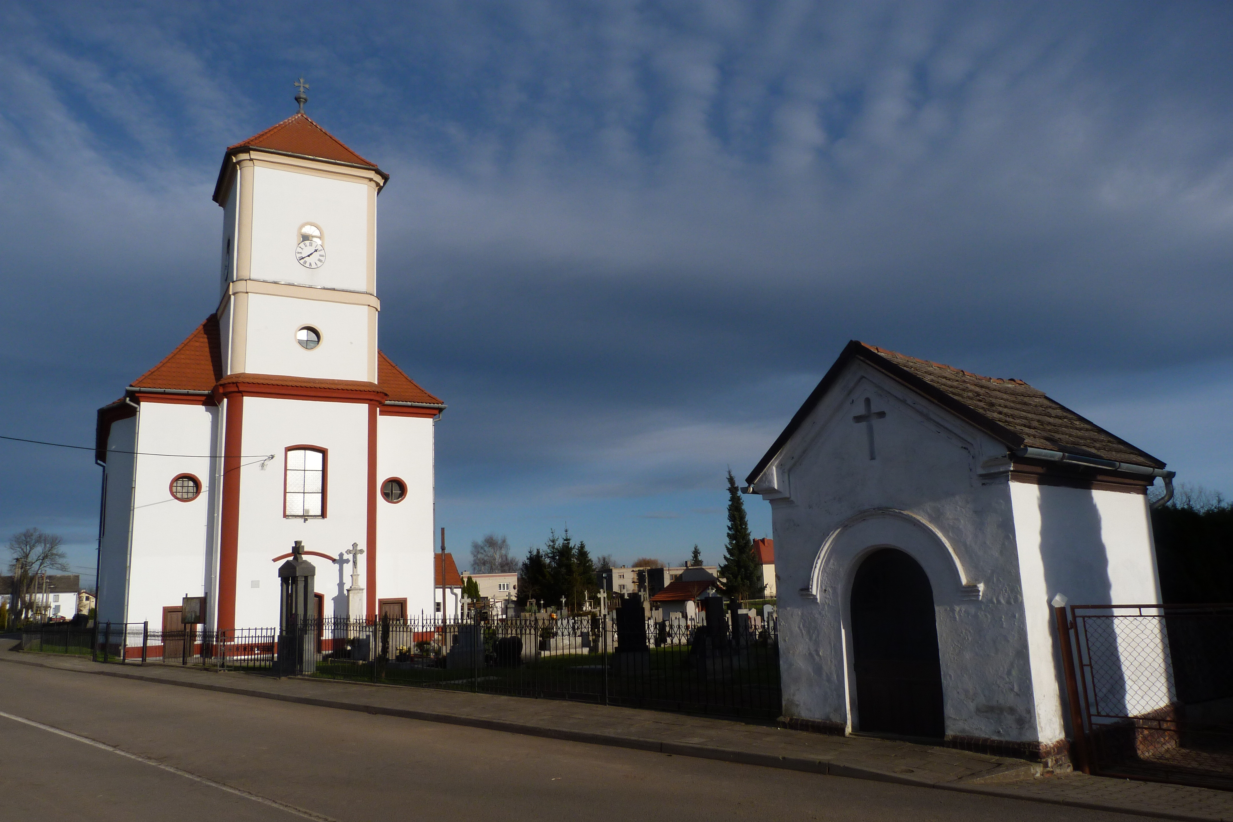 Pohled na kostel sv. Jiří s kaplí